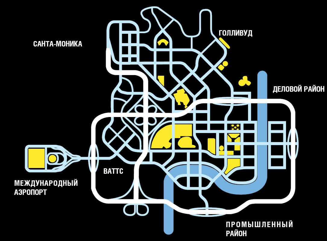 Карта г. Лос-Анджелес в игре Midnight Club II